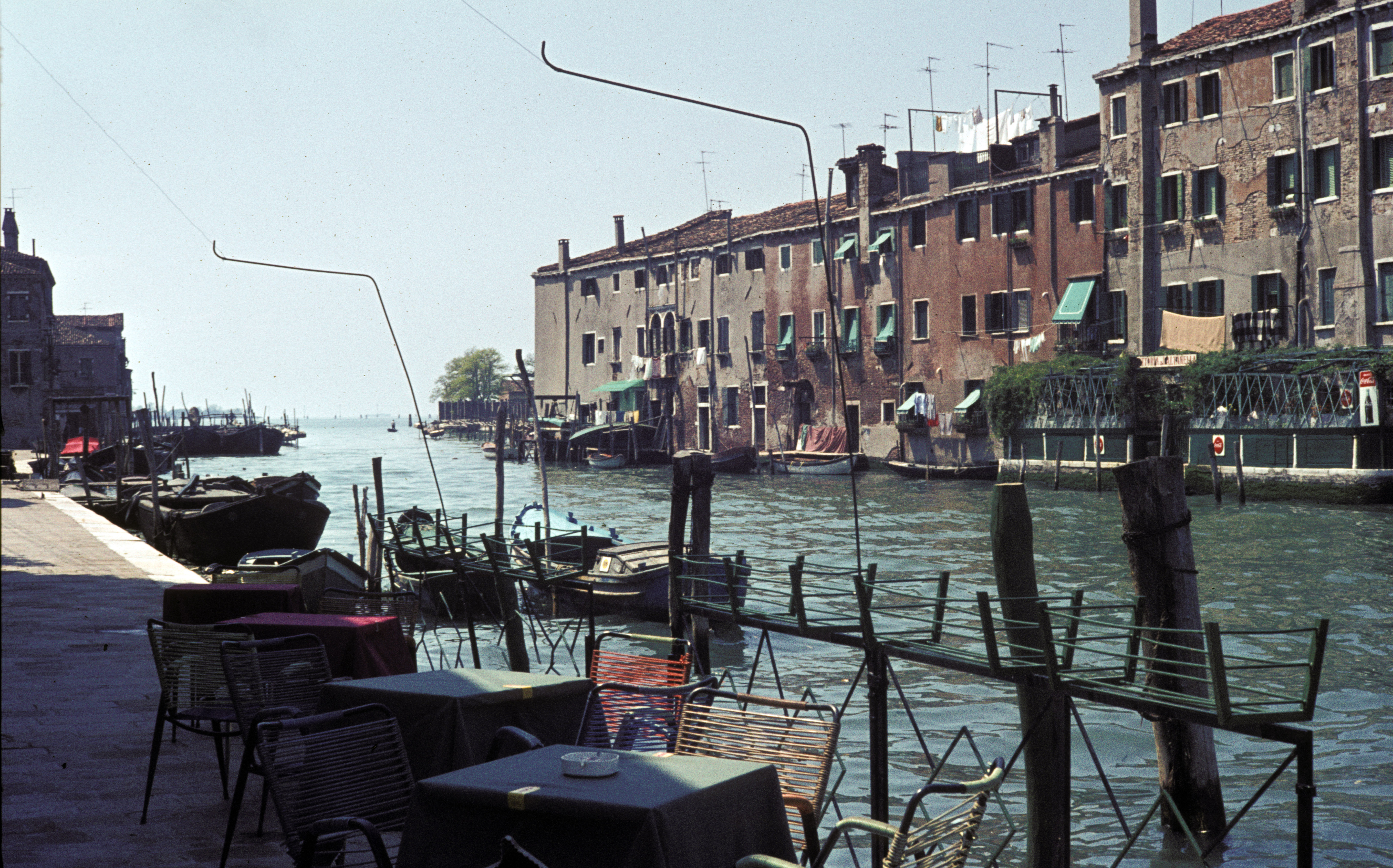 Venice